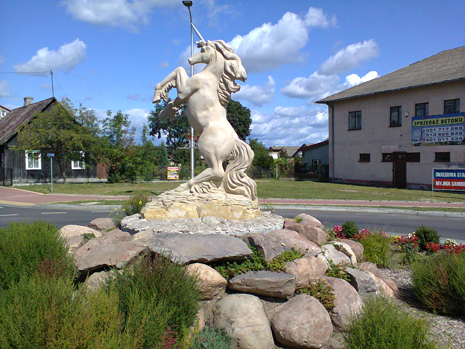 Jednorożec - figura na rondzie